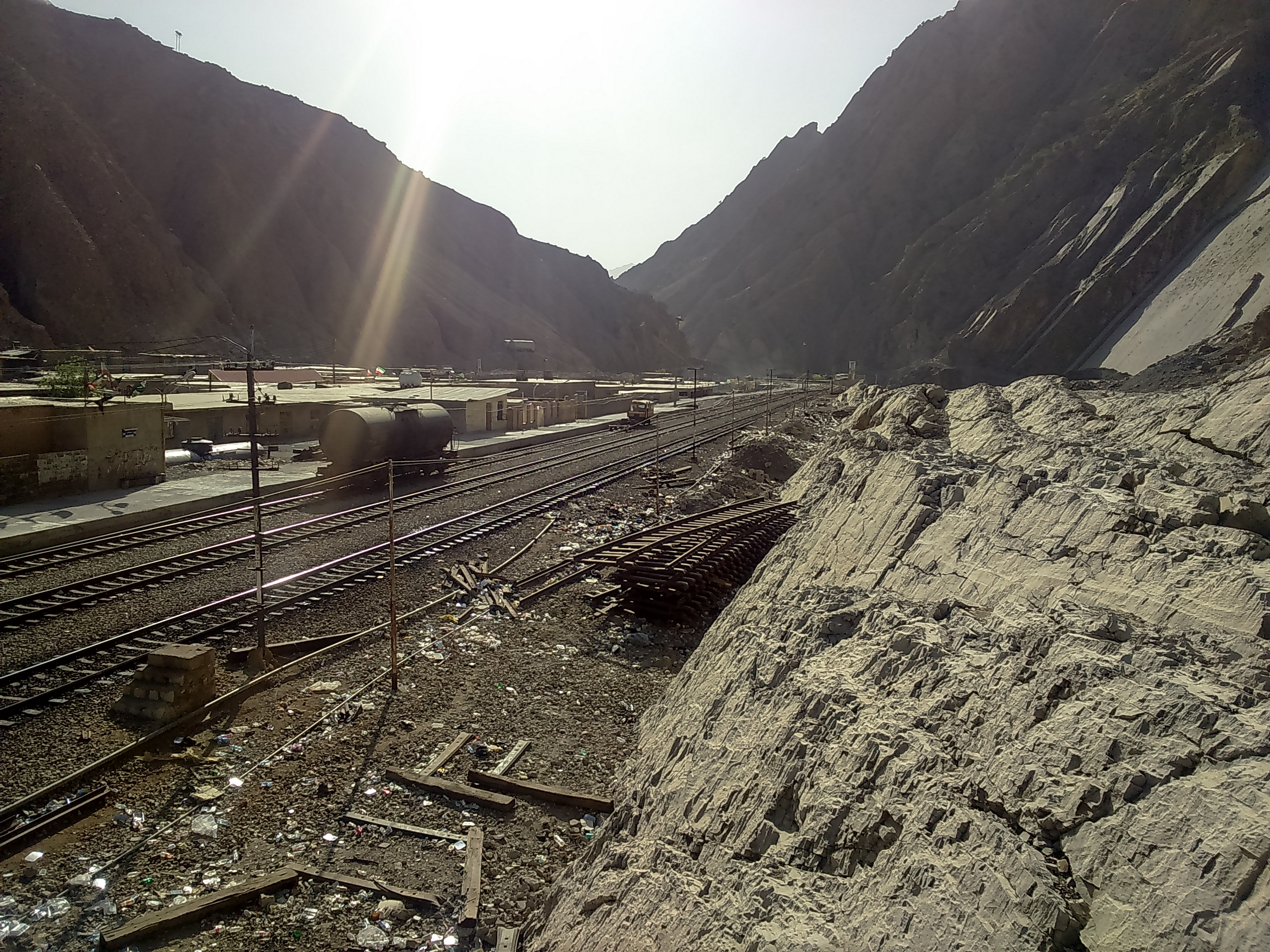 تصویر از کوه روبروی ایستگاه تنگ 5 ثبت شده و واگن مخزن سوخت در خط یک ایستگاه در حال سوخت رسانی به موتورخانه ایستگاه برای تامین برق ایستگاه و اهالی میباشد